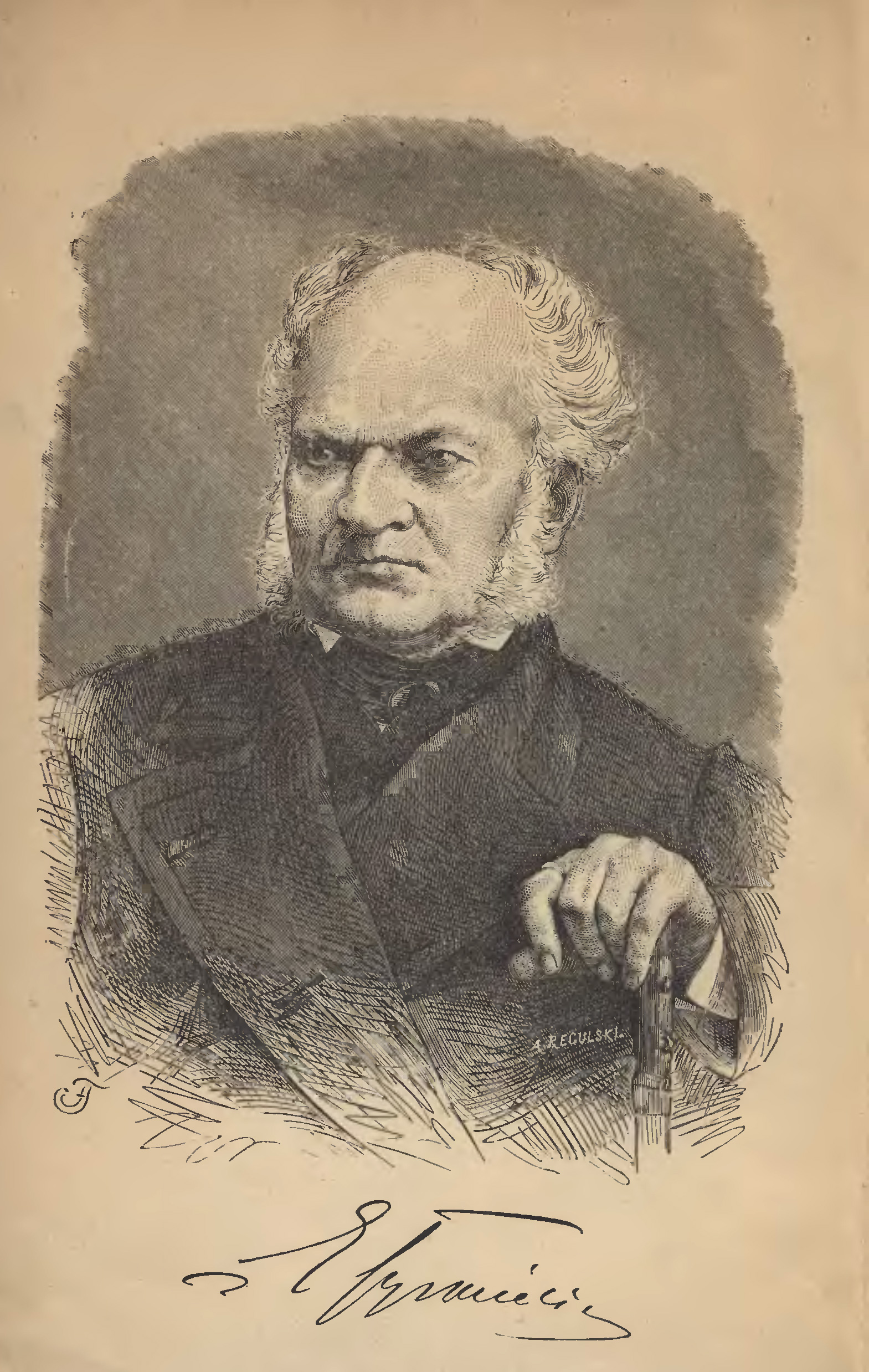 Беларуская (тарашкевіца): Фатаграфічны партрэт Яўстаха Тышкевіча (Jaŭstach Tyškievič)